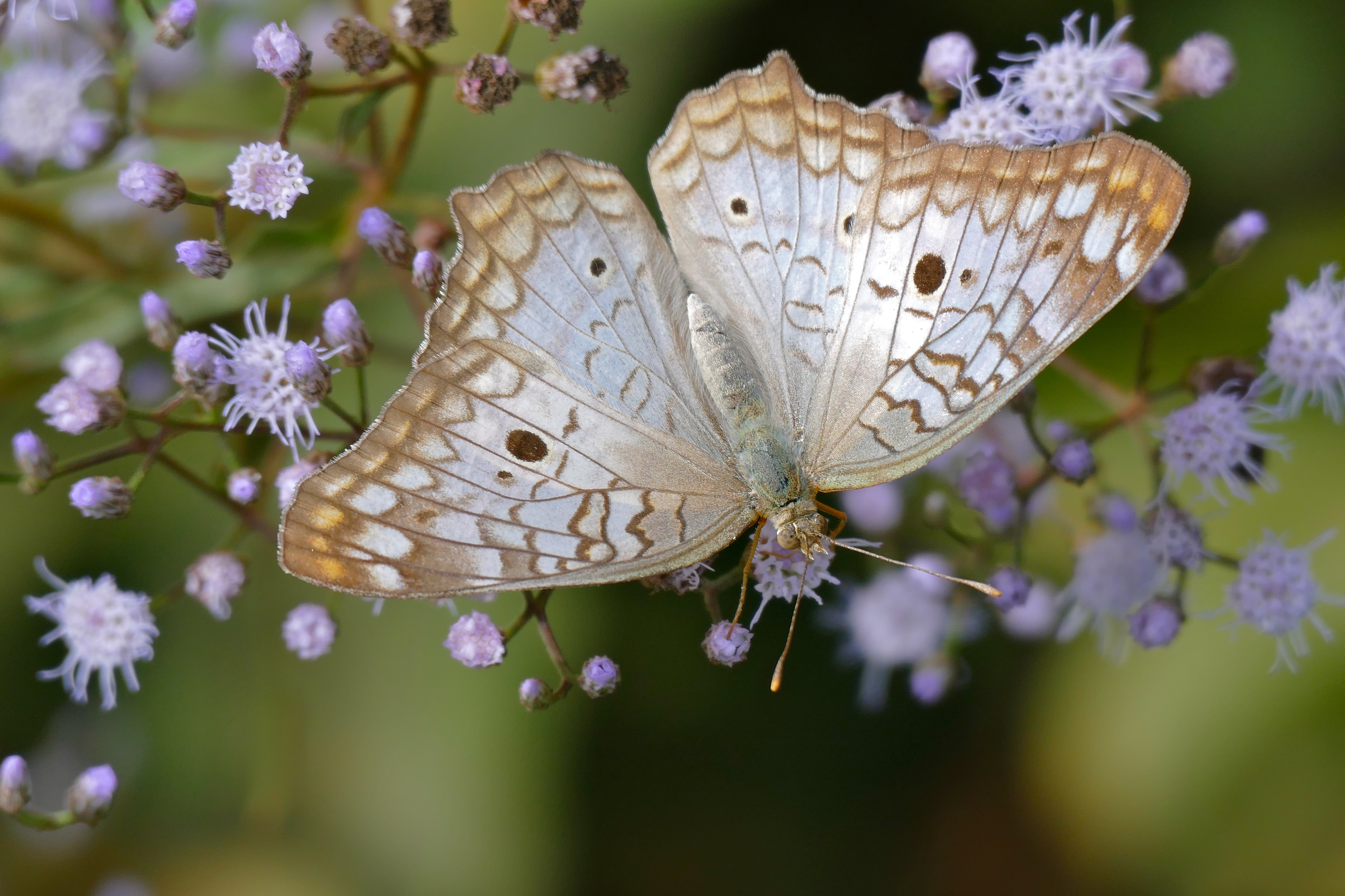 Baia das Pedras Access Road, Porto Cercado Area, Poconé, Mato Grosso, BRAZIL